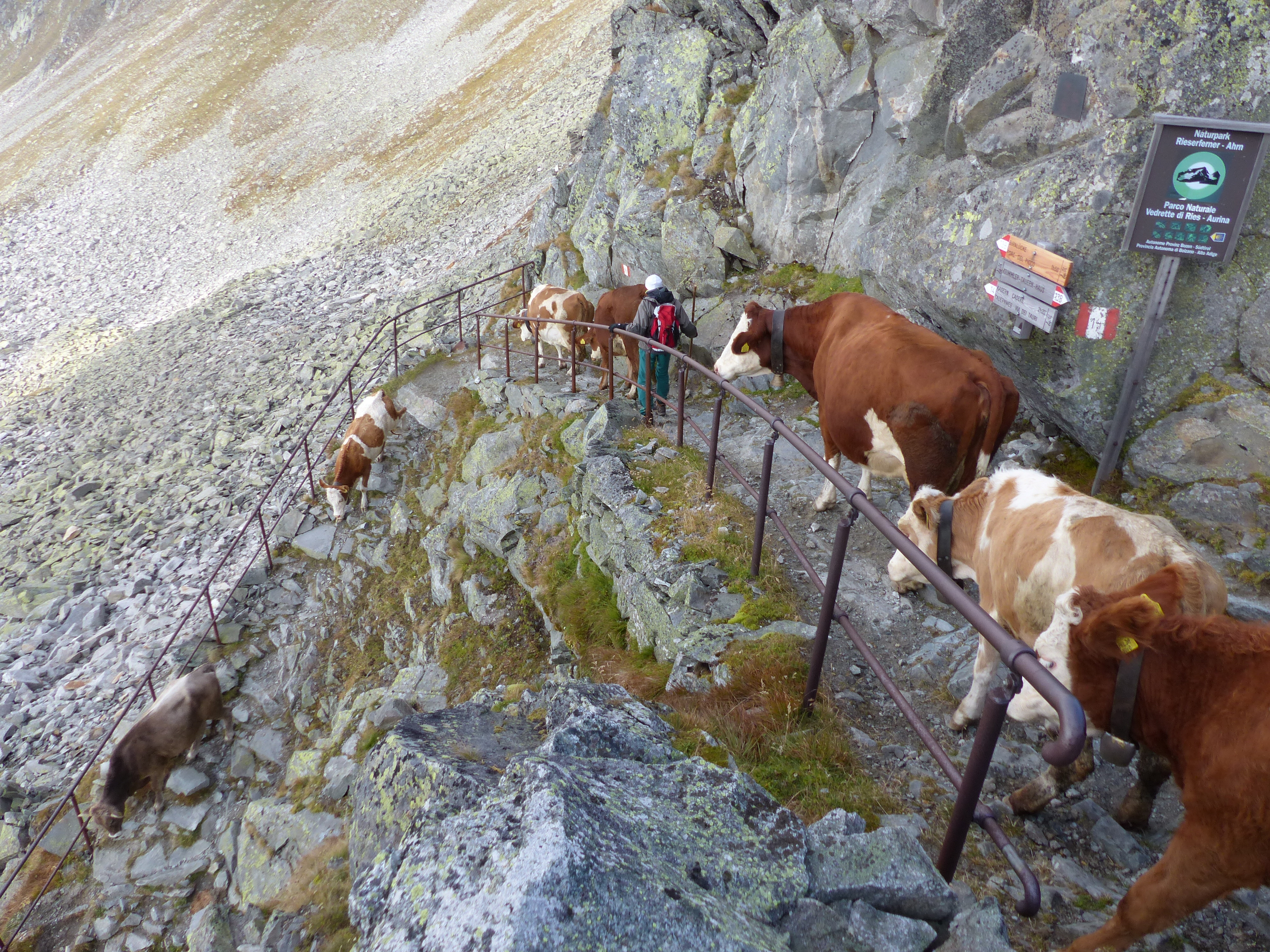 Viehtrieb von Rindern Ahrntaler Bauern über den Krimmler Tauern